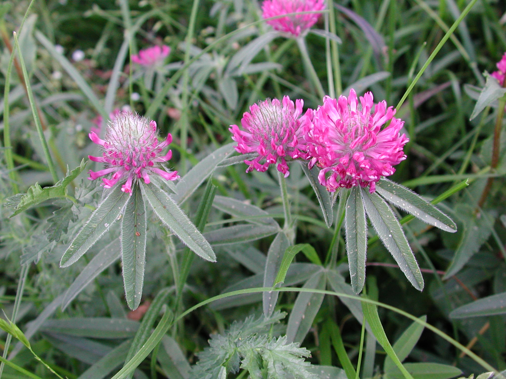 capolini (infiorescenze) di Trifolium alpestre